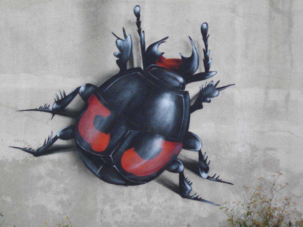 Photographie d'Hister illigeri illigeri Duftschmid, 1805: coléograffe de Twix sur un mur de l'ancienne caserne Pittié de Nevers (Nièvre).